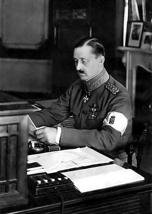 Suomen valtionhoitaja kenraali Mannerheim.